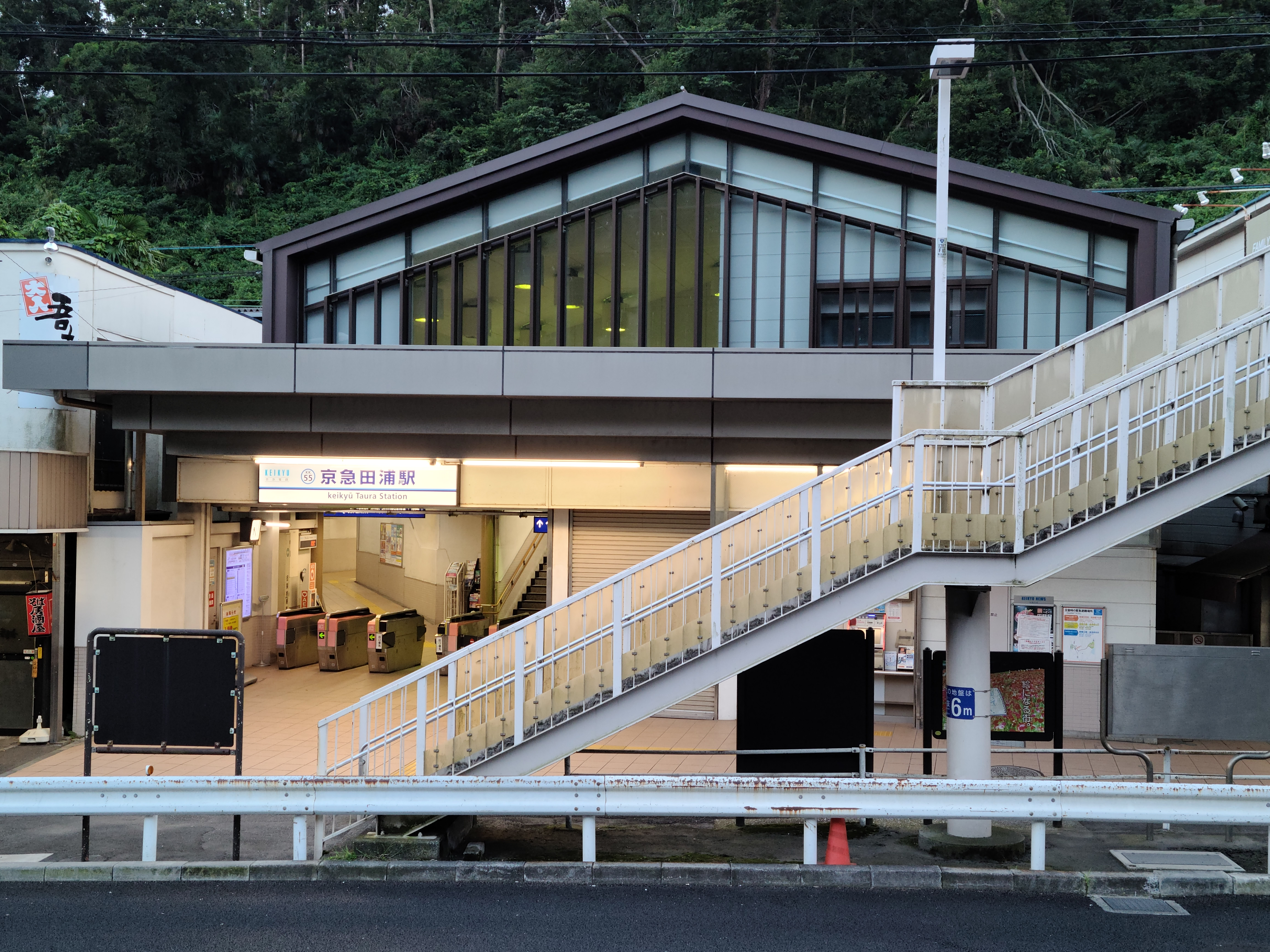 駅舎です。